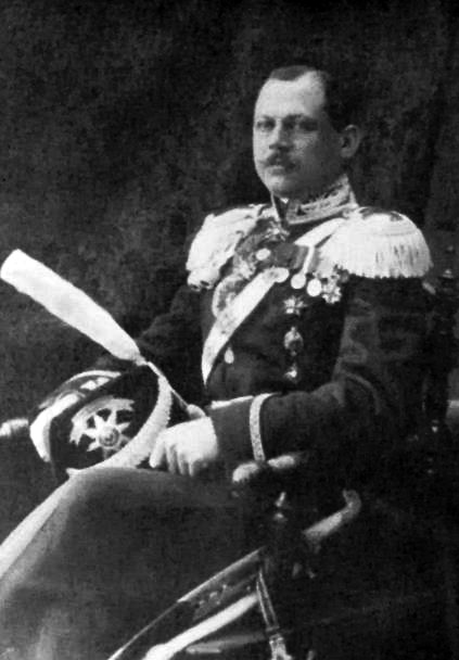 Командир 12-го Донского князя Потемкина Таврического полка полковник Е.И. Балабин